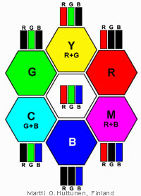 Näköjärjestelmämme toimii kolmivärikanavaisesti, jossa kahden kanavan tuottama väriaistimus on aina kolmannenkäänteisväri.